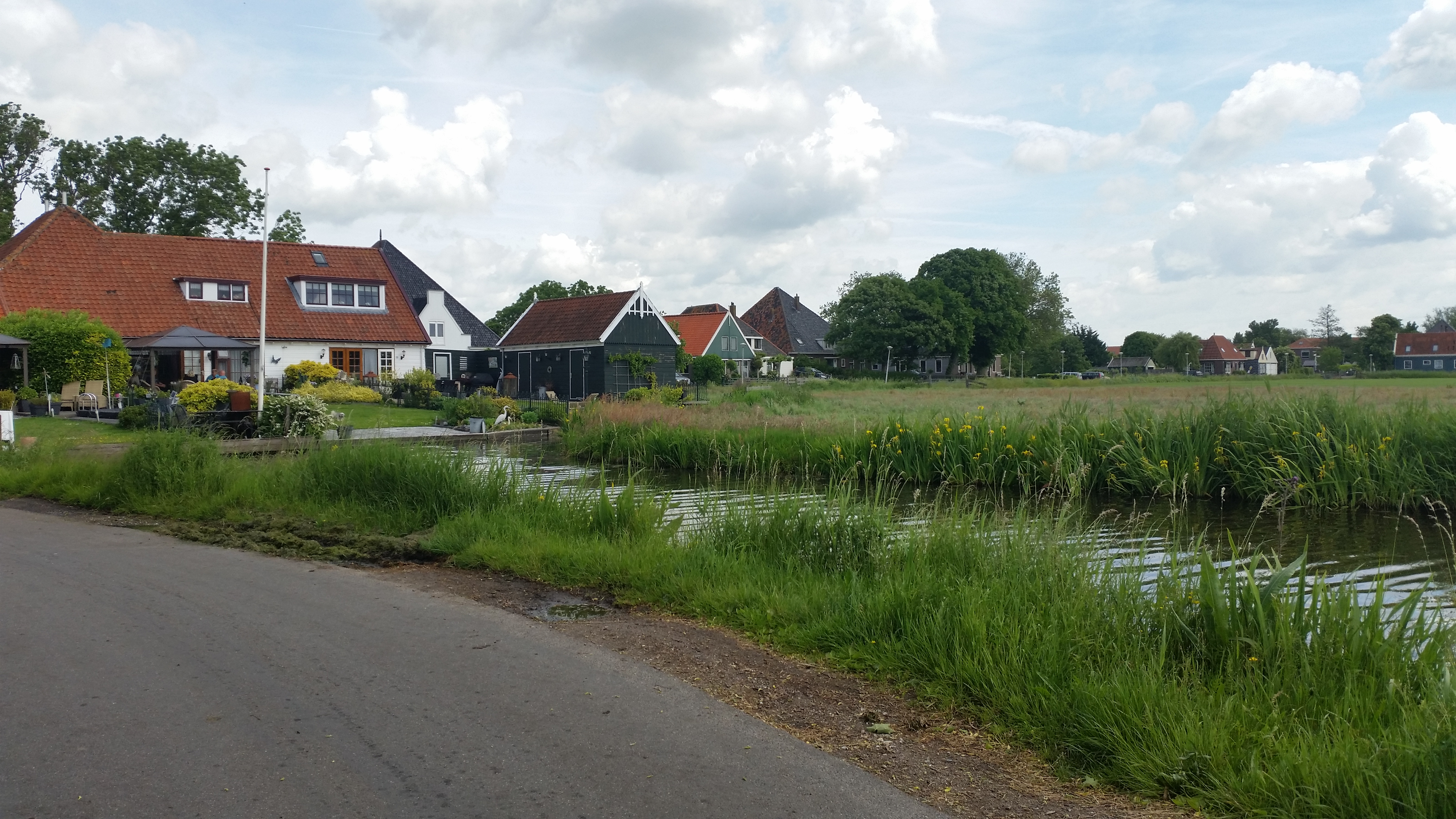 Achtergevels en zicht op 't Nopeind; gezien vanaf Termietergouw (schooltje)